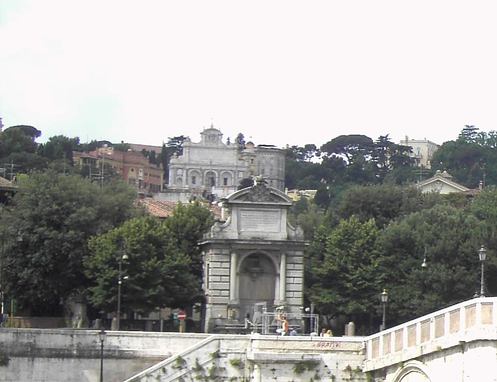 Roma, i Fontanoni dell'Acqua Paola da Ponte Sisto. In alto il Fontanone del Gianicolo; in basso il Fontanone dei Cento Preti.